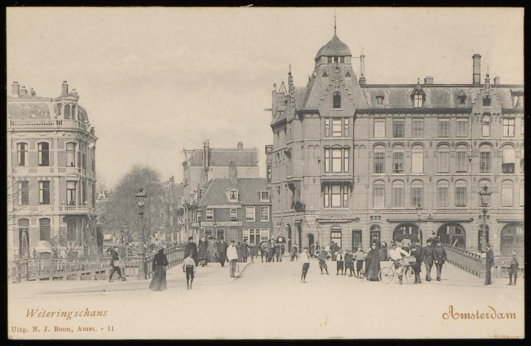 Beschrijving Weteringschans 79 (links) en 83-85 (in 1981 gesloopt) en links nr. 24 gezien vanaf de Stadhouderskade naar de Spiegelgracht 27 hoek tweede WeteringdwarsstraatUitgave N.J. Boon, AmsterdamDocumenttype prentbriefkaartVervaardiger Boon, N.J. (uitgever)Collectie Collectie Stadsarchief Amsterdam: prentbriefkaartenDatering 1900 ca.Geografische naam SpiegelgrachtWeteringschansWeteringschansInventarissen PBKD00073000004 Generated with Dememorixer